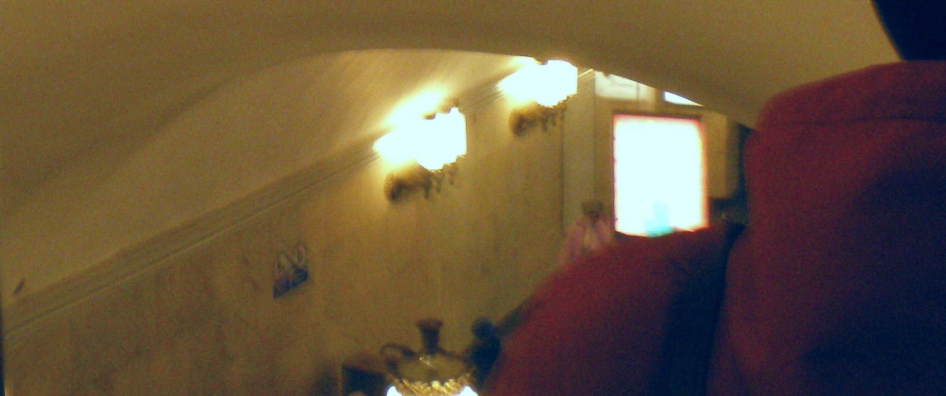 Нижний эскалаторный зал станции Нарвская